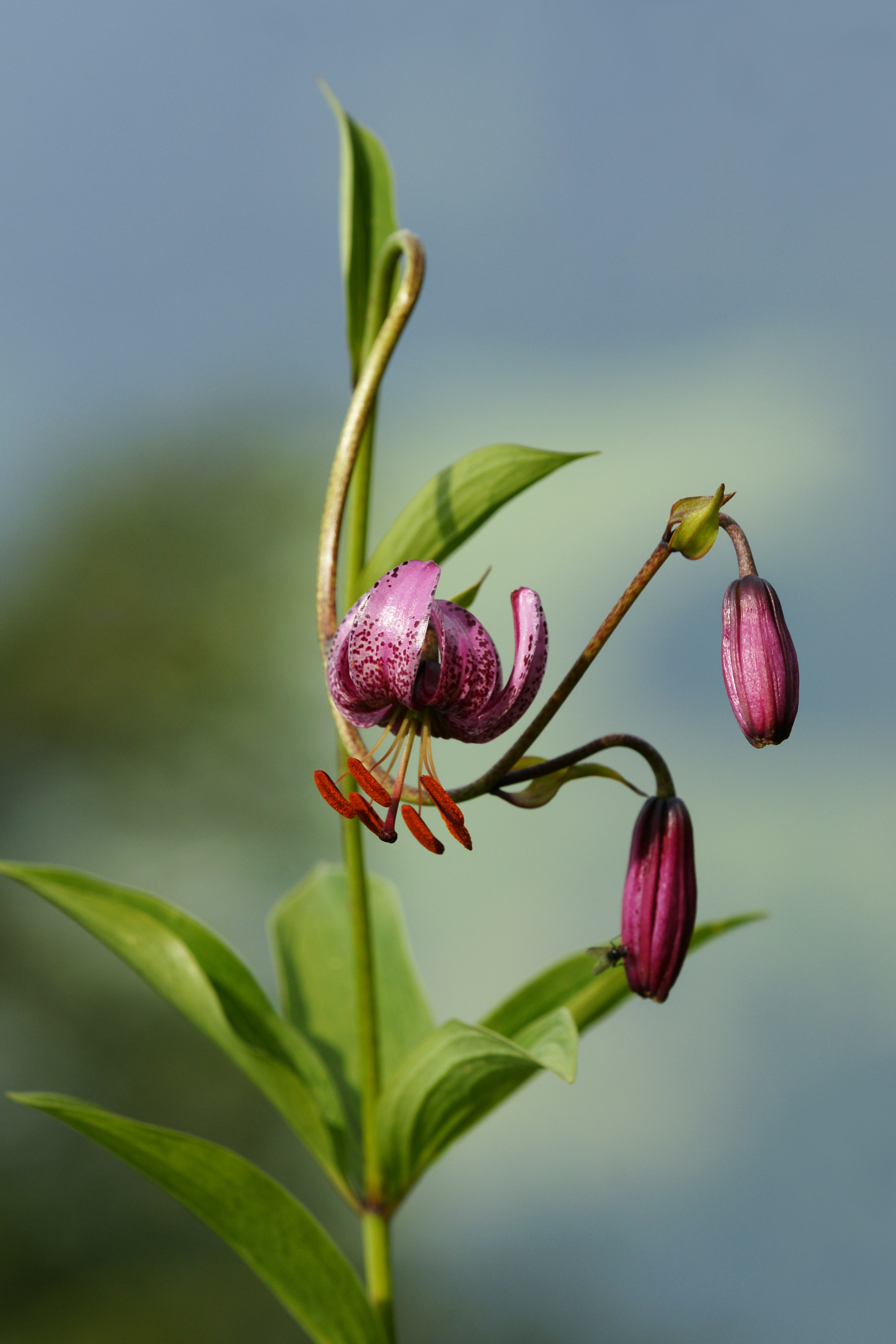 Der Türkenbund (Lilium martagon), oder auch Türkenbund-Lilie, ist eine Pflanzenart aus der Gattung der Lilien (Lilium) in der nach ihr benannten Martagon-Sektion. Fundort: am Wurzelweg zum 1.456m hohen Staufenberg bei Dornbirn. Der gebogene Blütenstil ist atypisch für diese Pflanze und nicht vom Fotografen verbogen worden.